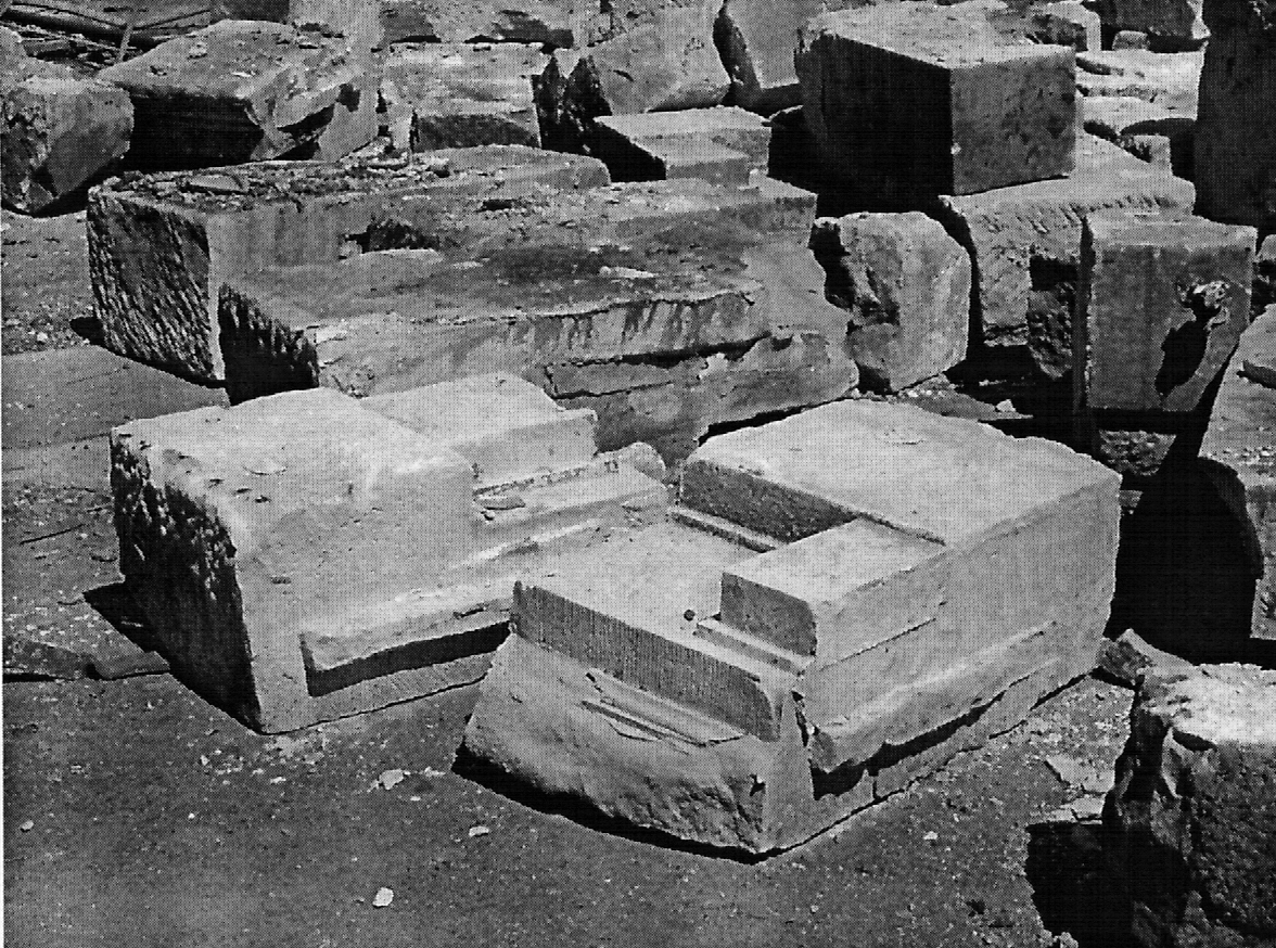 Martinskaserne, profilierte Gesimssteine